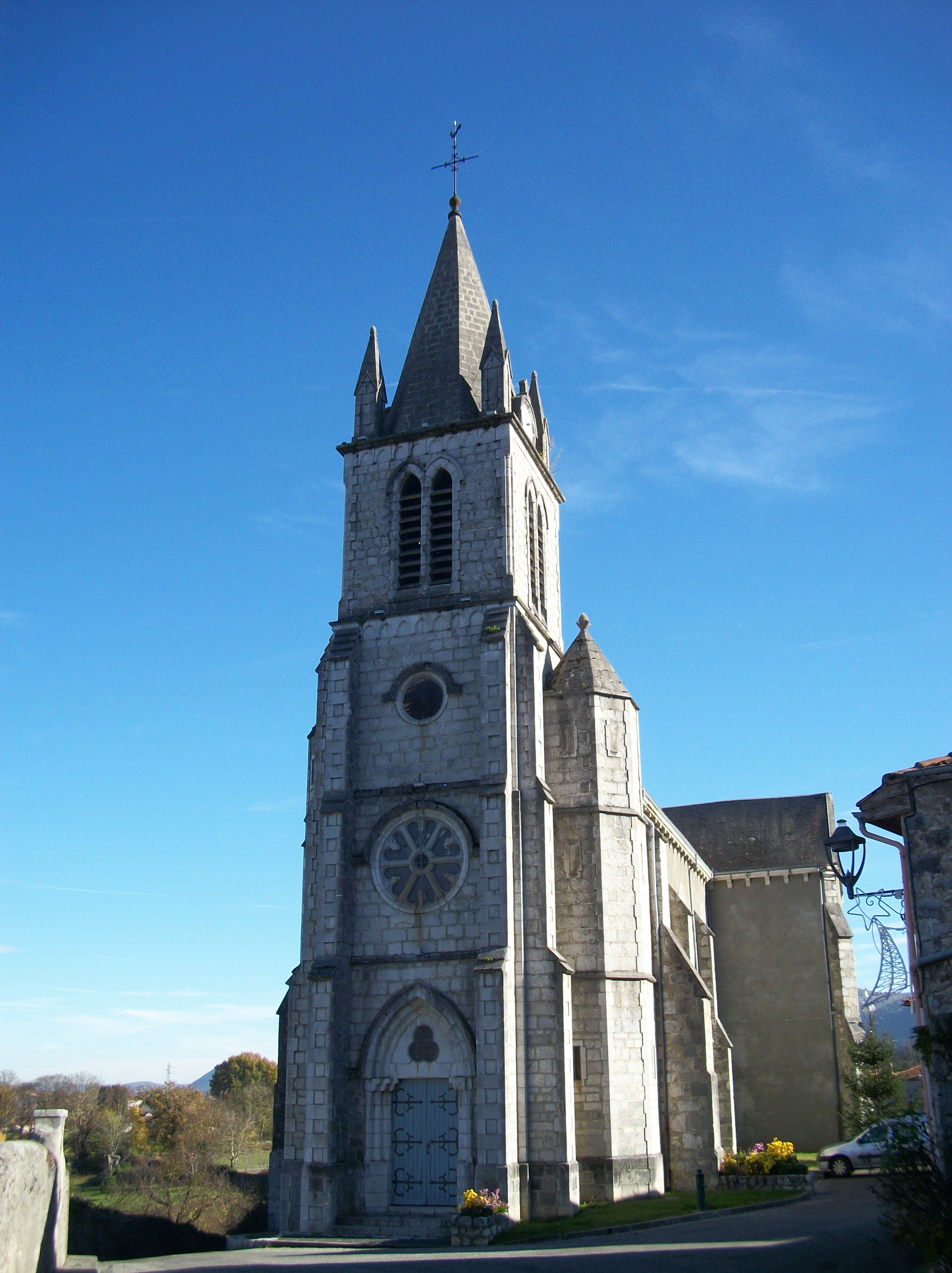 Église Saint-Vincent